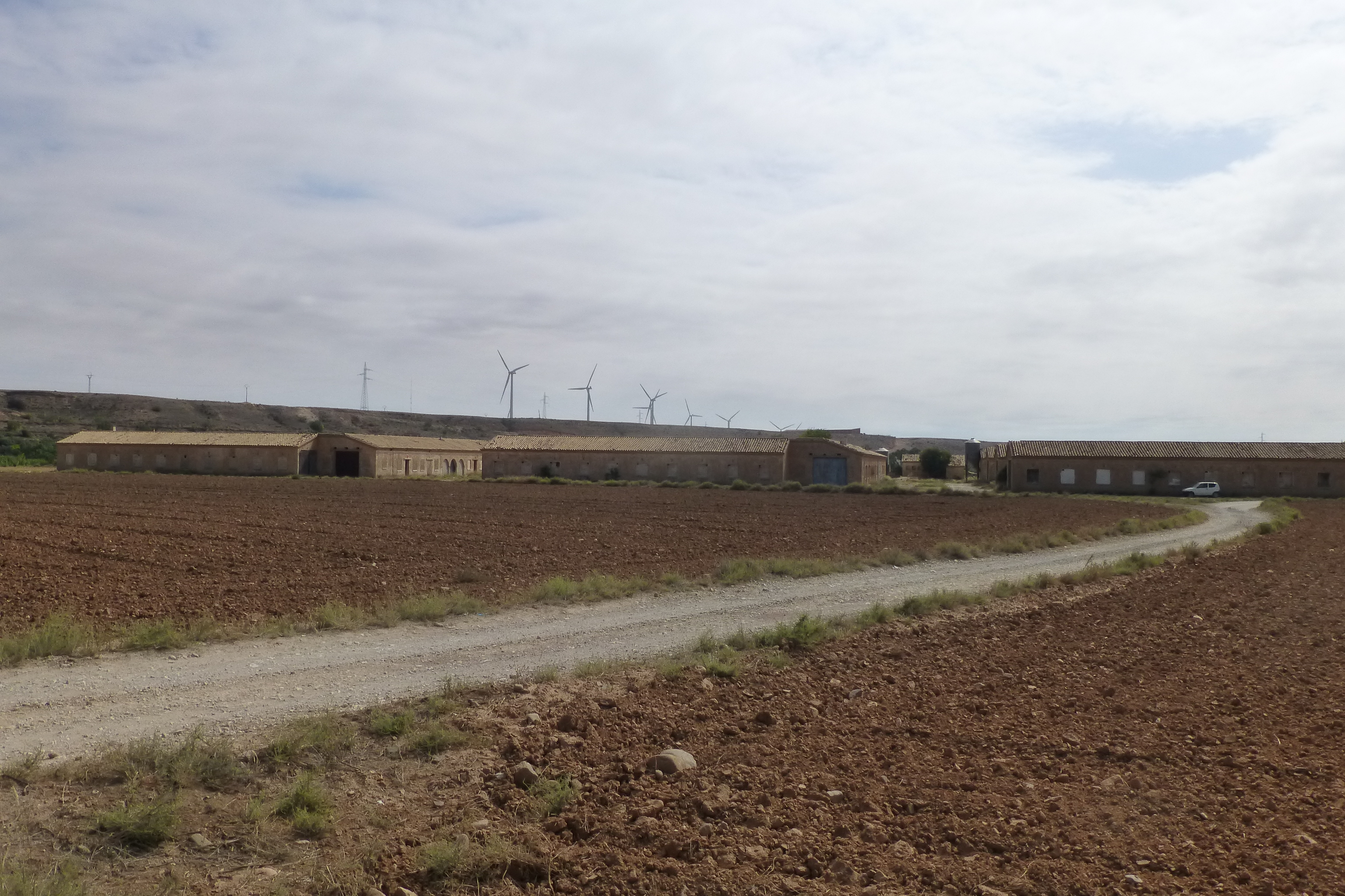 Pabellones de "La pequeña Rusia" construidos tras la guerra civil española para albergar a los prisioneros del bando republicano que trabajaron en la construcción del "Pueblo nuevo de Belchite" en ellos también se alojaron algunas familias civiles de ideología de izquierdas.